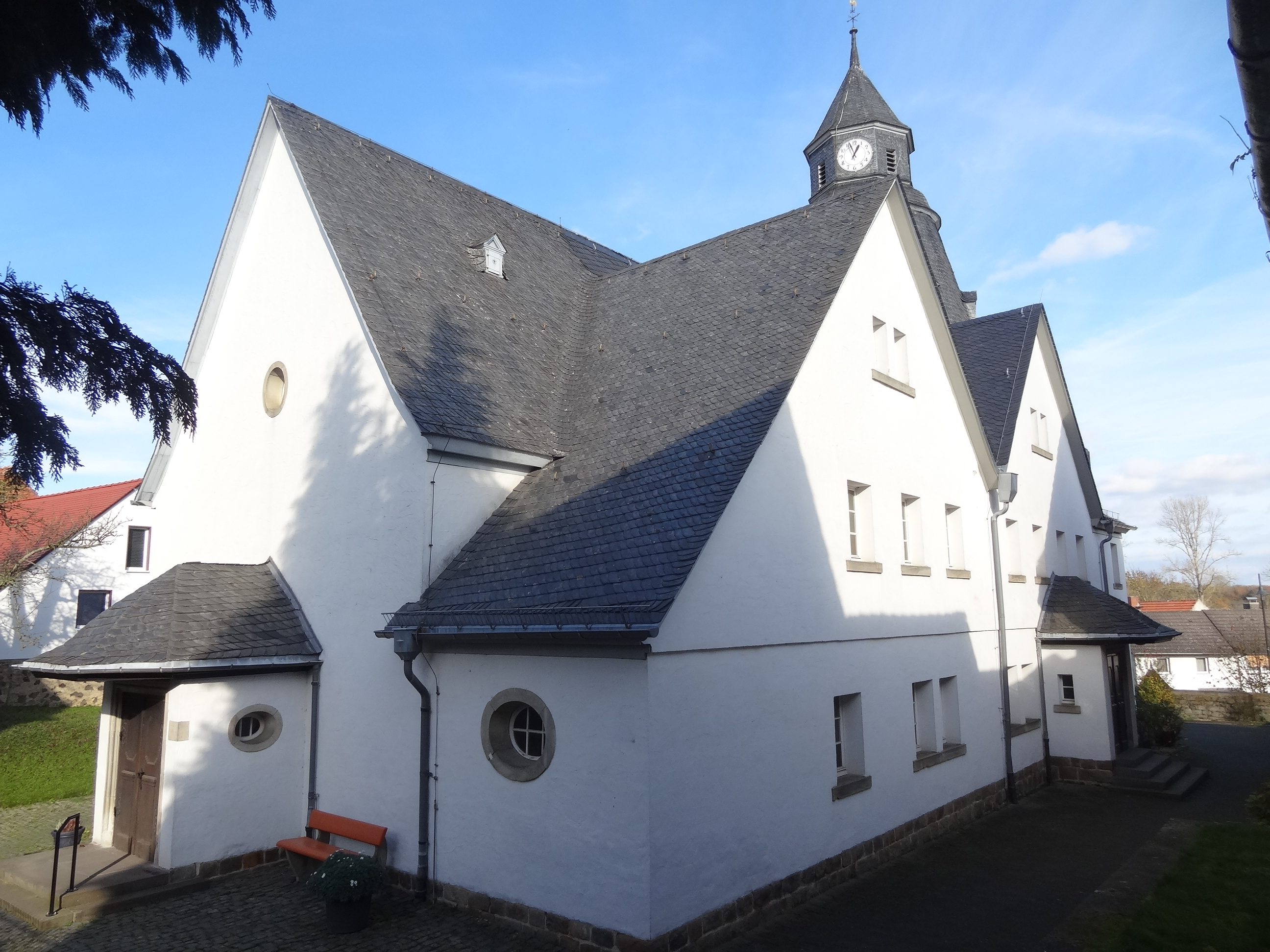 Evangelische Pfarrkirche (Griedel)